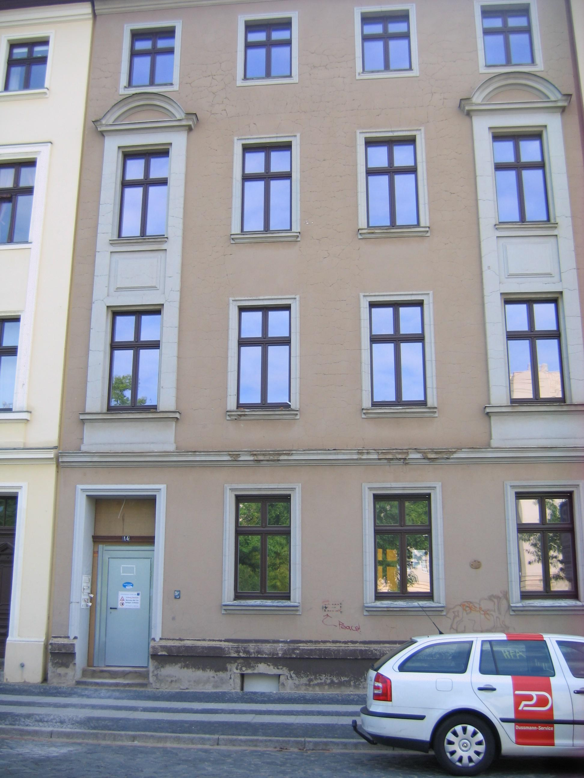 Wernerstraße 14